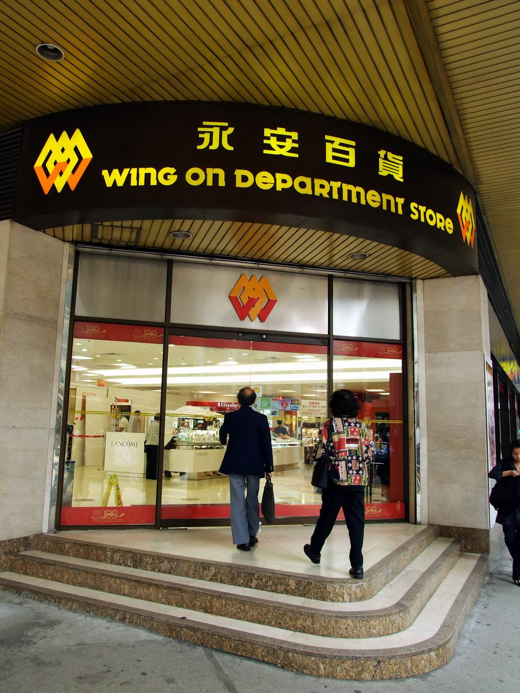 永安百貨